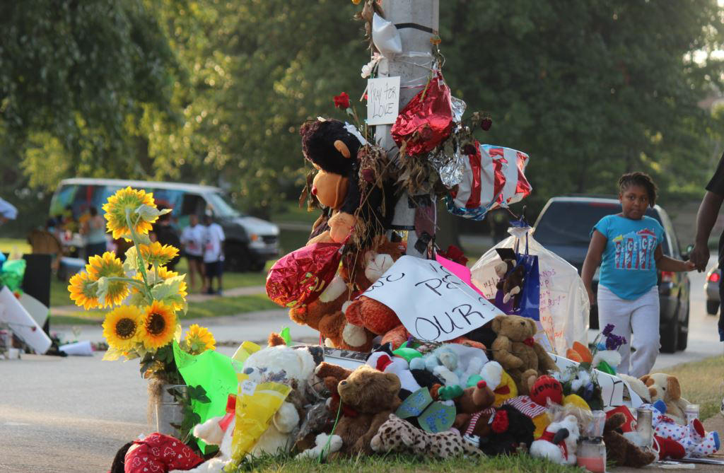 2014'te ABD'nin Ferguson kentinde vurulan Michael Brown'ı anmak için gerçekleştirilen bir etkinlikten kare.